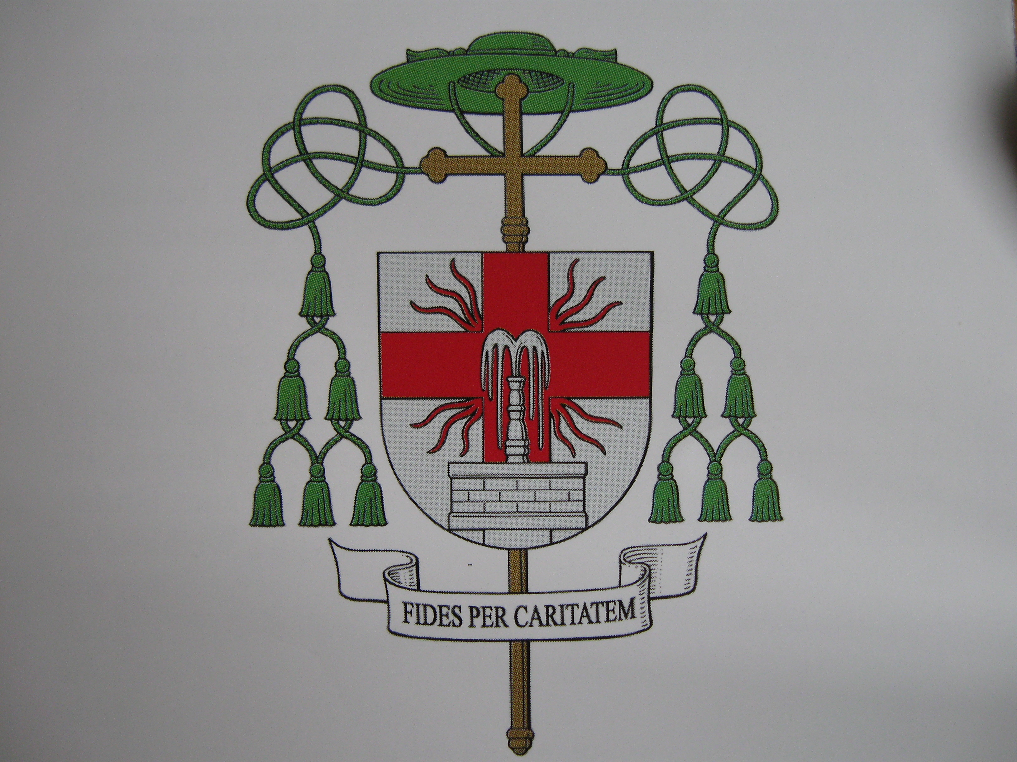 Bischofswappen des Weihbischofs in Mainz und Titularbischofs von Catrum, Werner Guballa (1944-2012). Es nimmt Motive seines Geburtsorts Marienborn auf